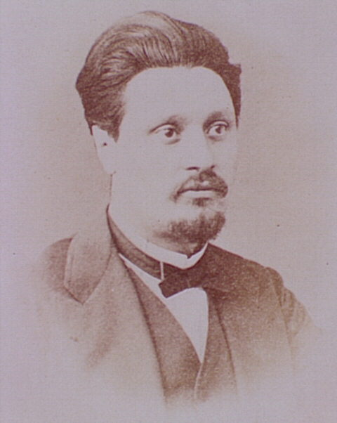 Auguste Sicard (1839-1912)